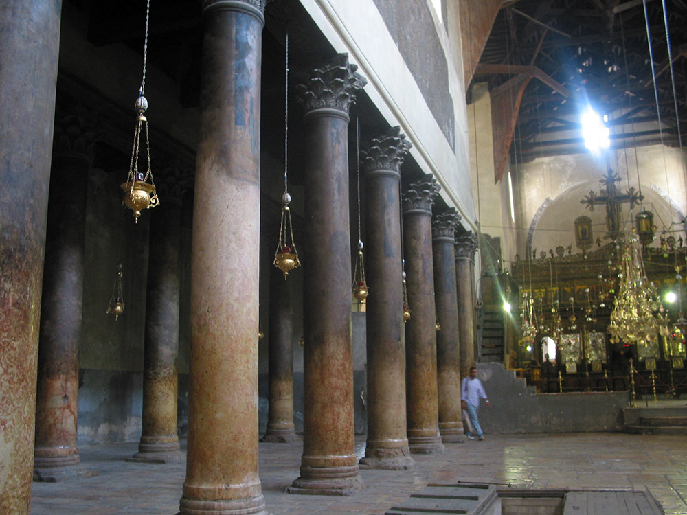 Interior de la Basílica de la Natividad